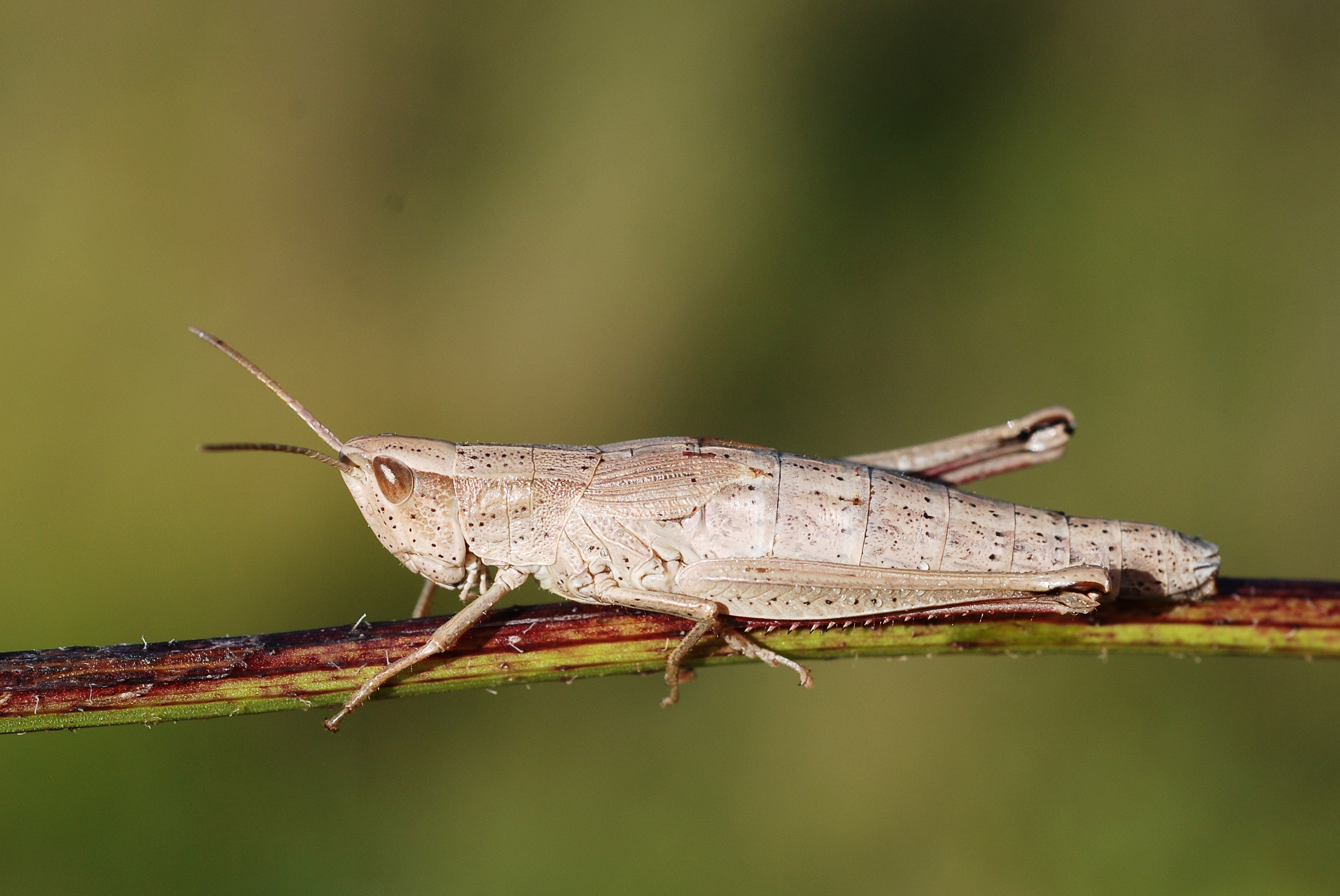 Chrysochraon dispar female